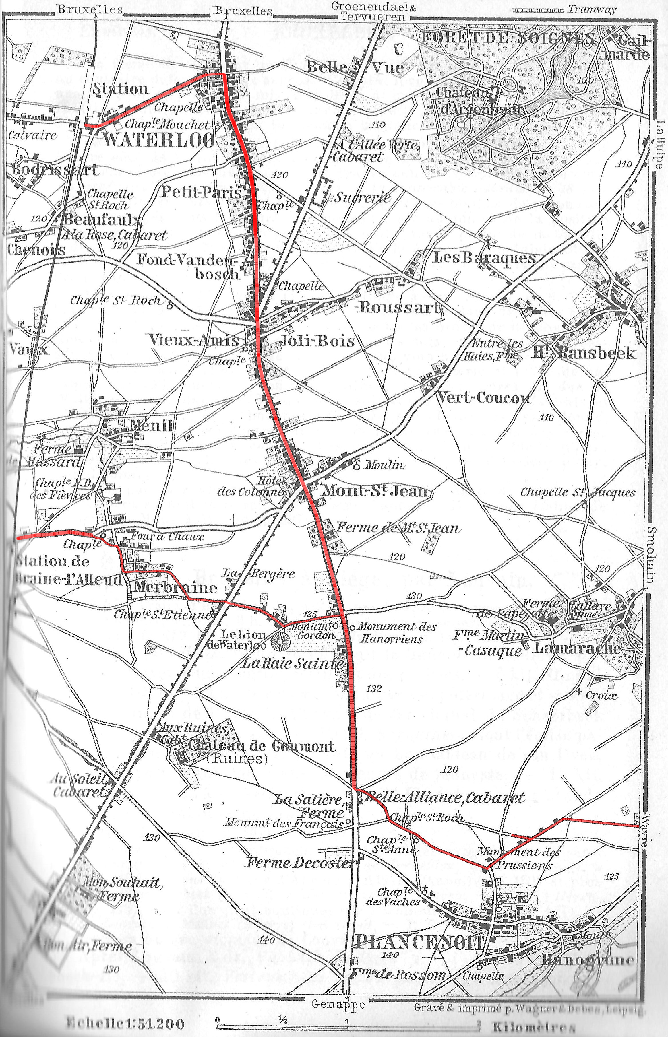 Bijgekleurde versie van File:Waterloo and monument 1905.jpg waarbij de buurtspoorlijnen ingetekend zijn. Op de oorspronkelijke is een kleine route fout.